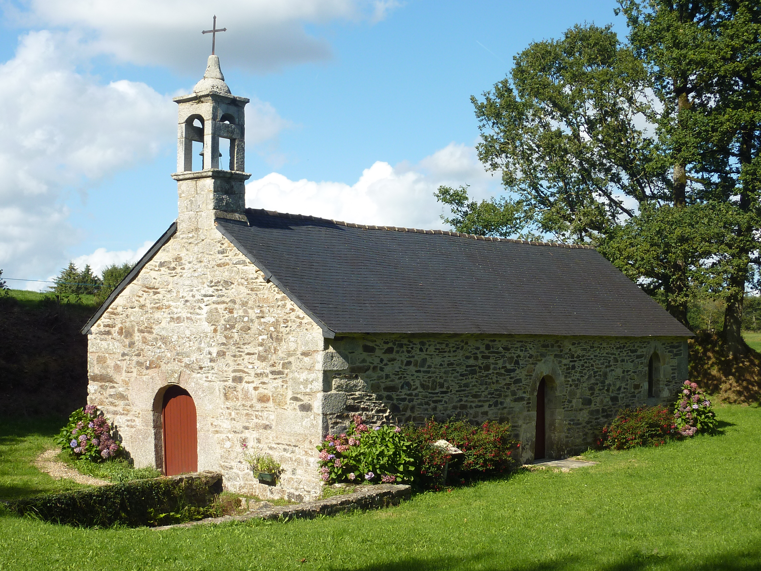 Poullaouen: la chapelle du Paradis